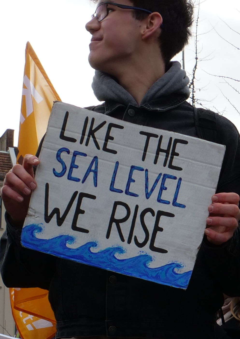 FridaysForFuture Demonstration am 8. Februar 2019 im Invalidenpark in Berlin.